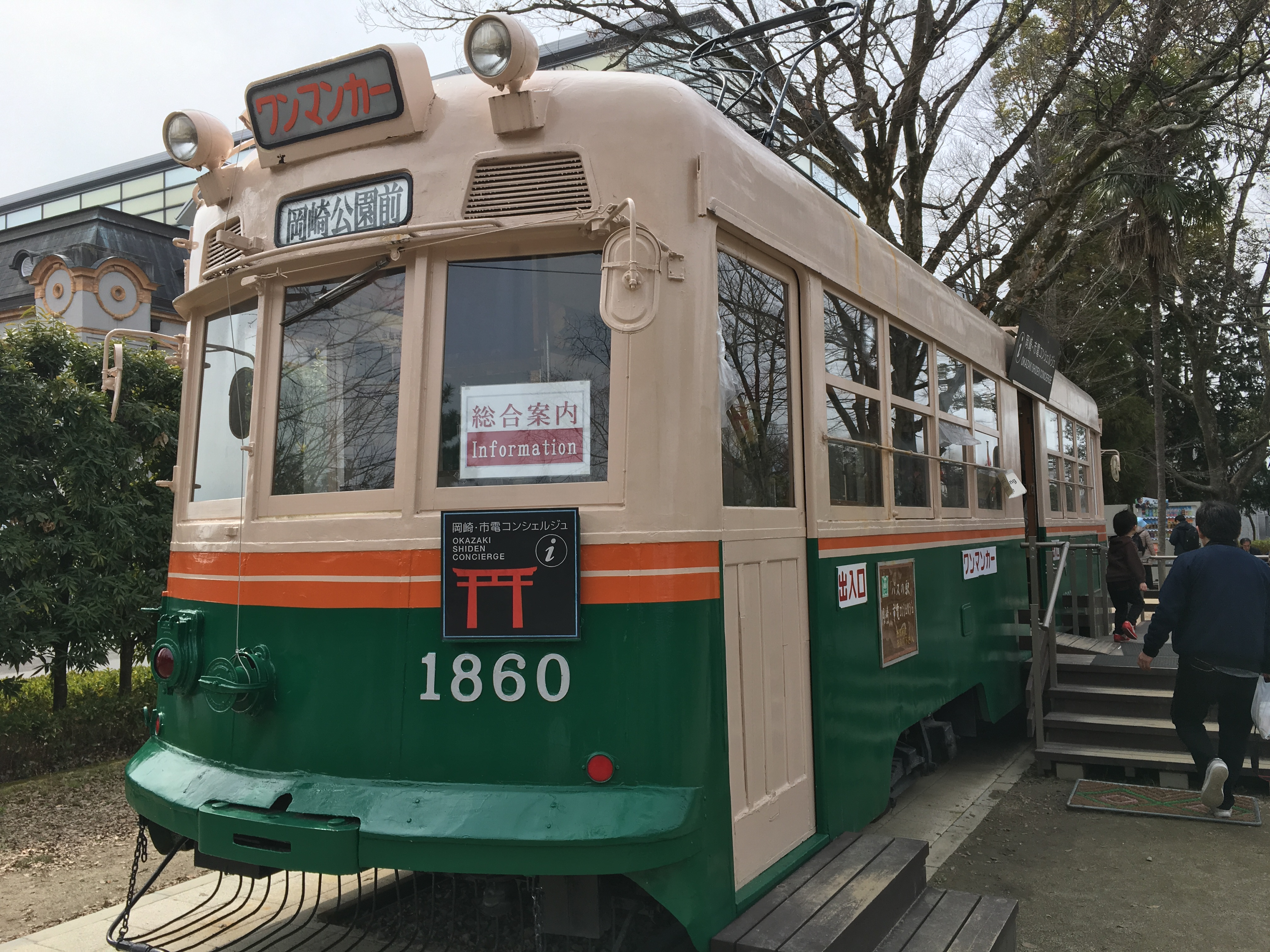 岡崎・市電コンシェルジュ（元京都市電1800型 1860号）